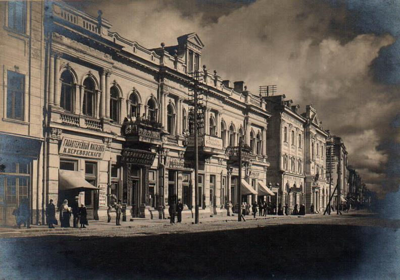 Беларуская (тарашкевіца): Менск (Miensk), вуліца Захараўская (vulica Zacharaŭskaja) каля скрыжаваньня з завулкам Захараўскім (zavułak Zacharaŭski)